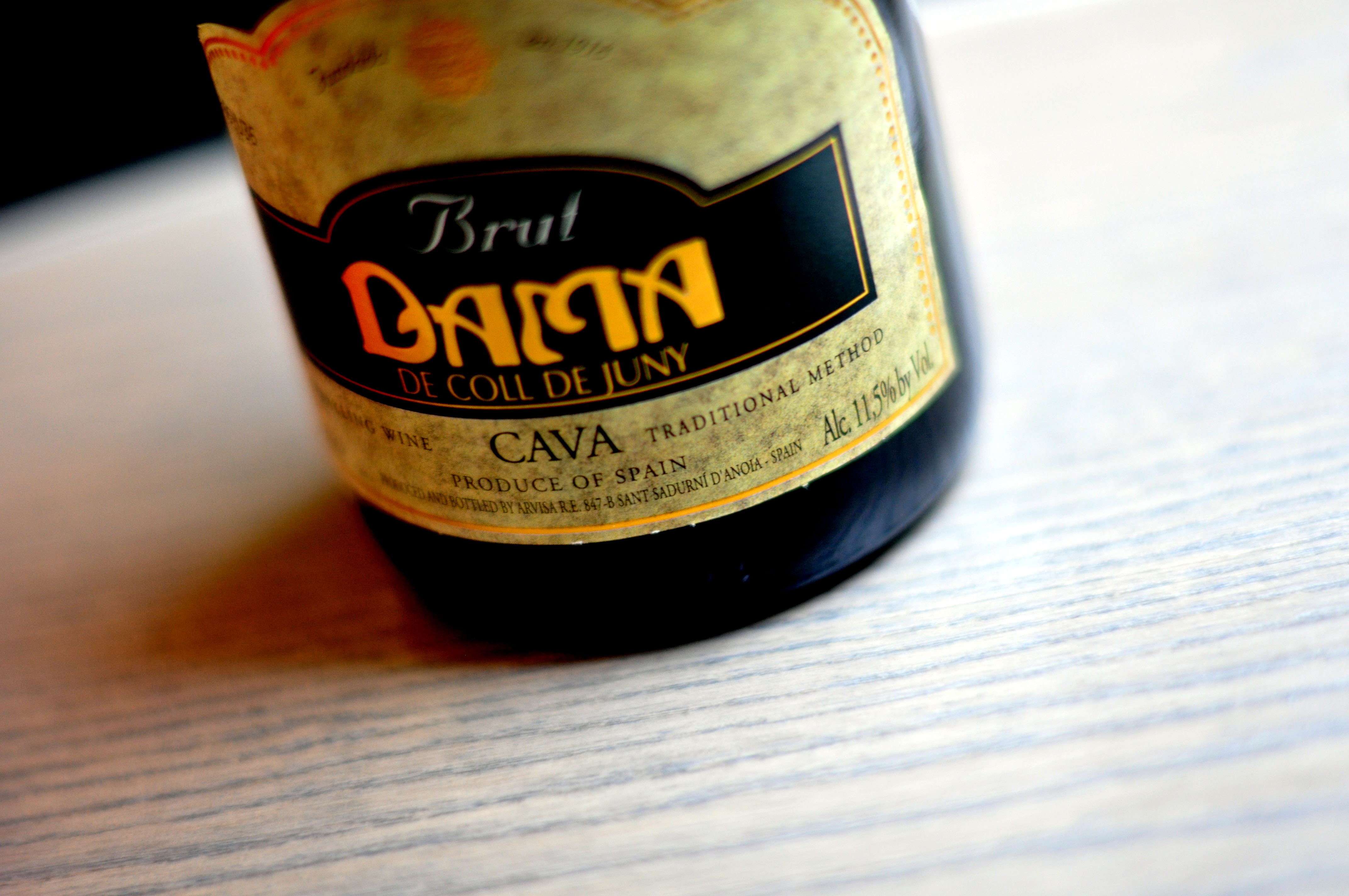 Cava